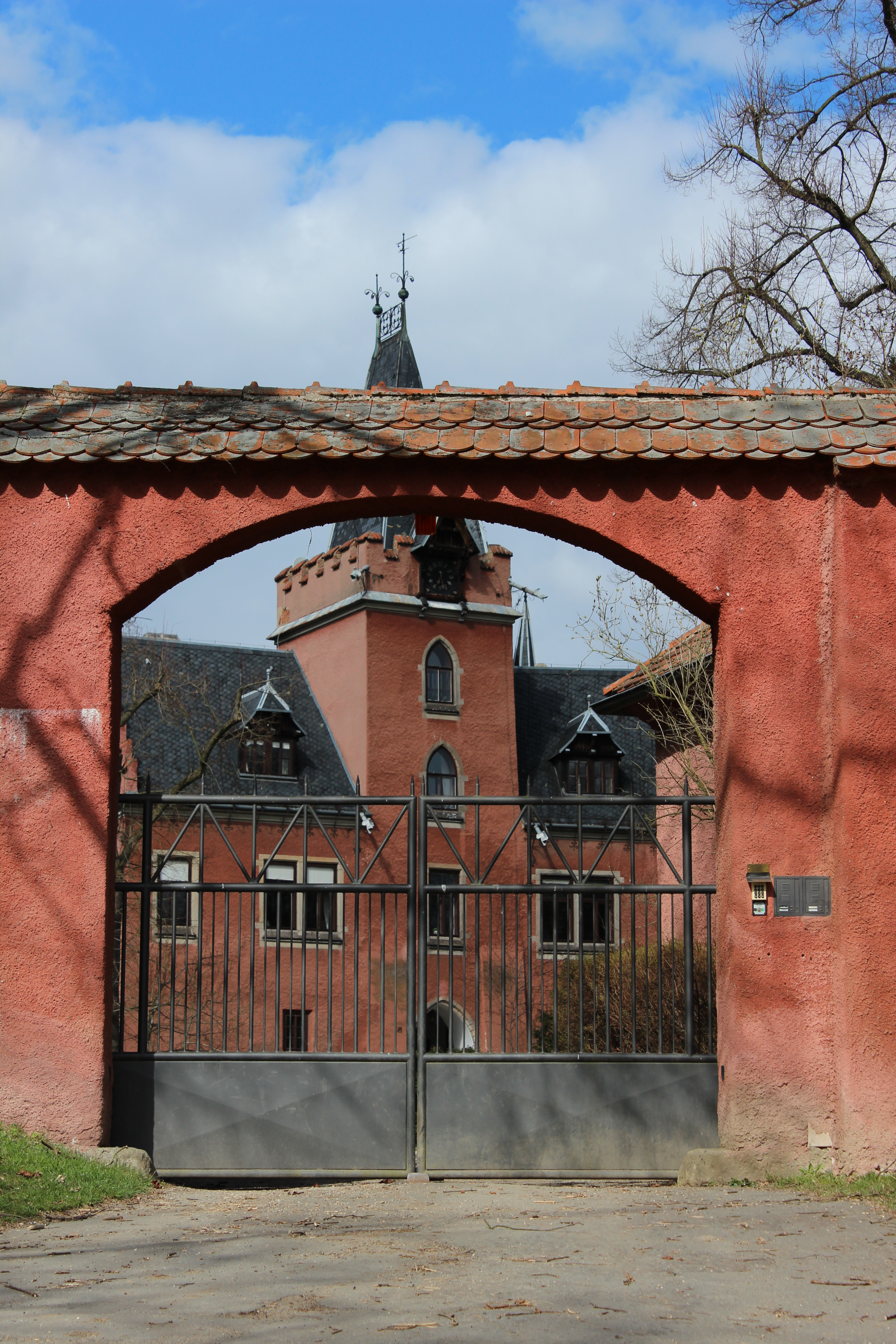 Červený Hrádek – zámek na východě města Sedlčany. Okres Příbram. Česká republika.